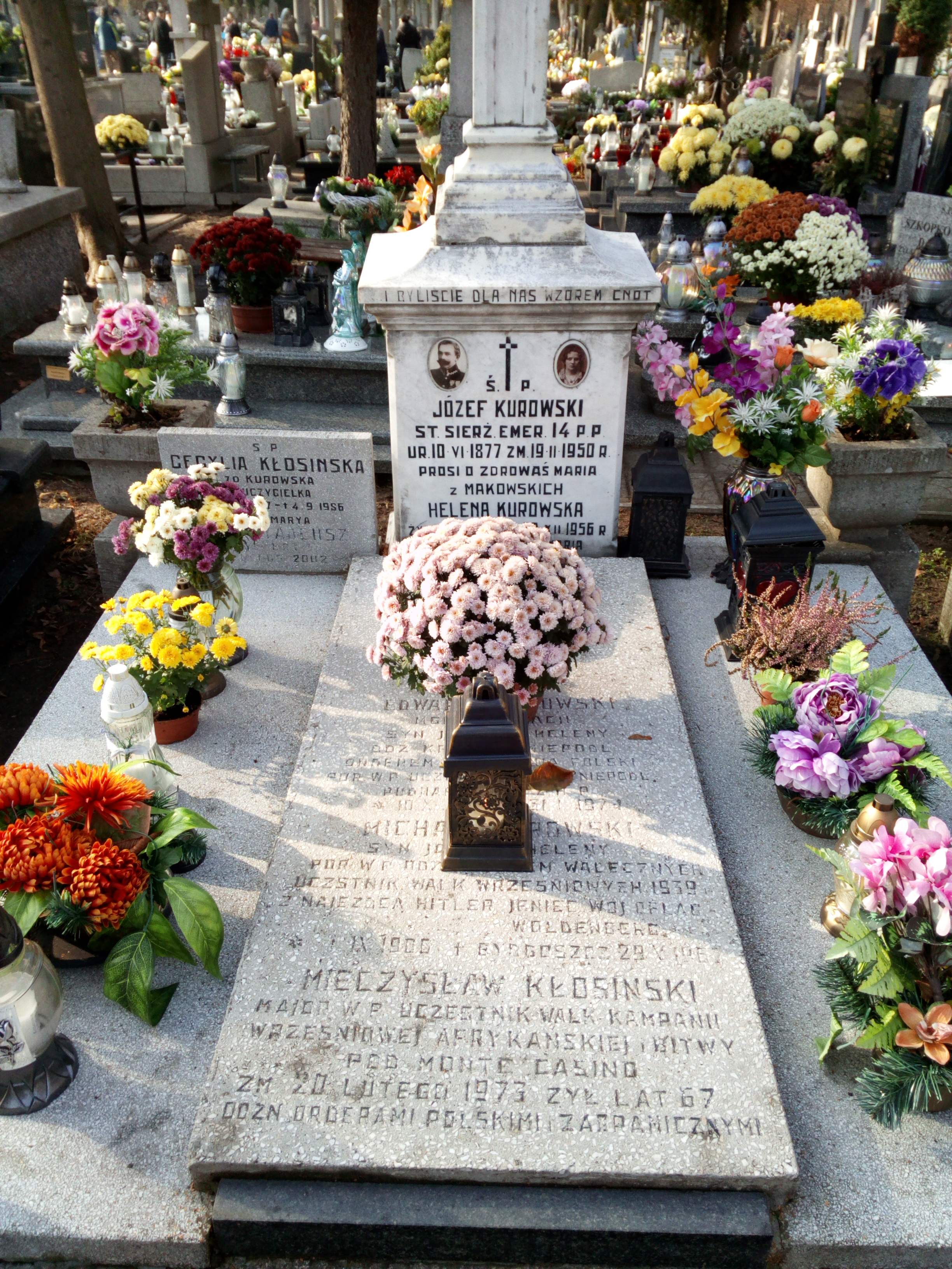 Symboliczna płyta nagrobna mjr. Kłosińskiego (stan na dzień 1.11.2019)